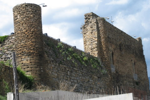 Castell de Sort a la comarca del Pallars Sobirà - Catalunya